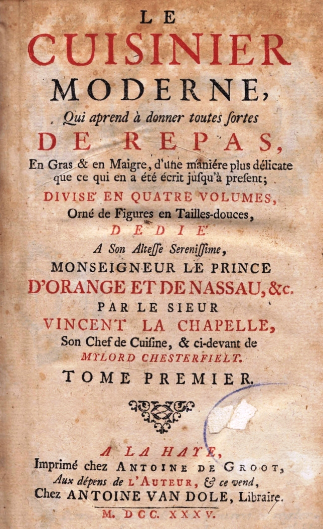 Vincent la Chapelle (1690 of 1703-1745) was een Franse kok in dienst van Phillip Dormer Stanhope, de vierde graaf van Chesterfield, tussen 1728 en 1731 de Engelse ambassadeur in Den Haag. Hij publiceerde in 1733 zijn driedelige werk The modern cook.